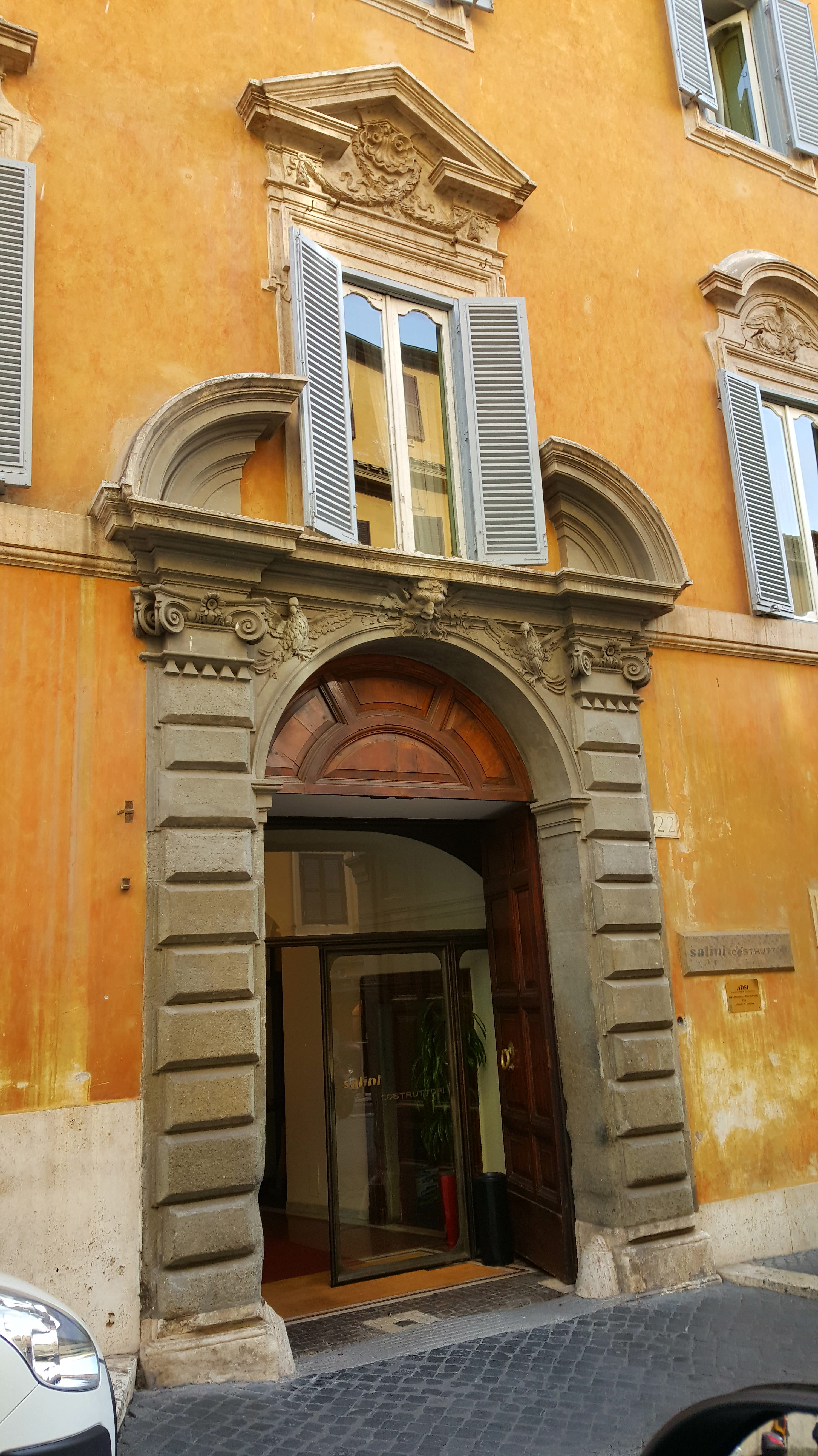 Sede Salini Impregilo a Roma, Via della Dataria, 22